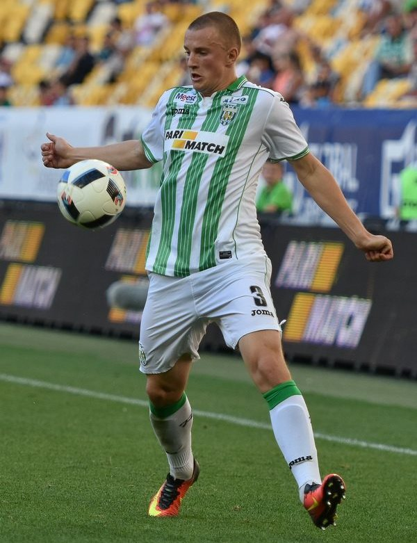 Василь Кравець - футболіст Карпат